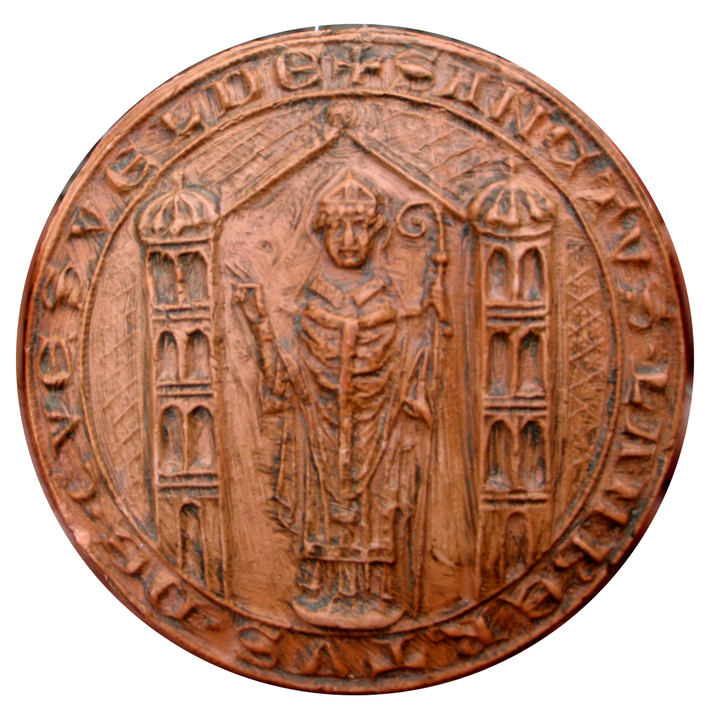 Das große Siegel der Stadt Coesfeld im Münsterland zeigt den Hl. Lambertus unter einem Giebeldach zwischen zwei Türmen. Die Umschrift lautet "Sanctus Lambertus de Cuesfelde". Dieses Siegel war nachweislich ab 1246 in Gebrauch. Vgl. Dr. Hans Hüer, Geschichte der Stadt Coesfeld, nach der Darstellung von Bernhard Sökeland neu bearbeitet und bis zum Zweiten Weltkrieg fortgeführt, S. 24. Regensberg, Münster 1947.